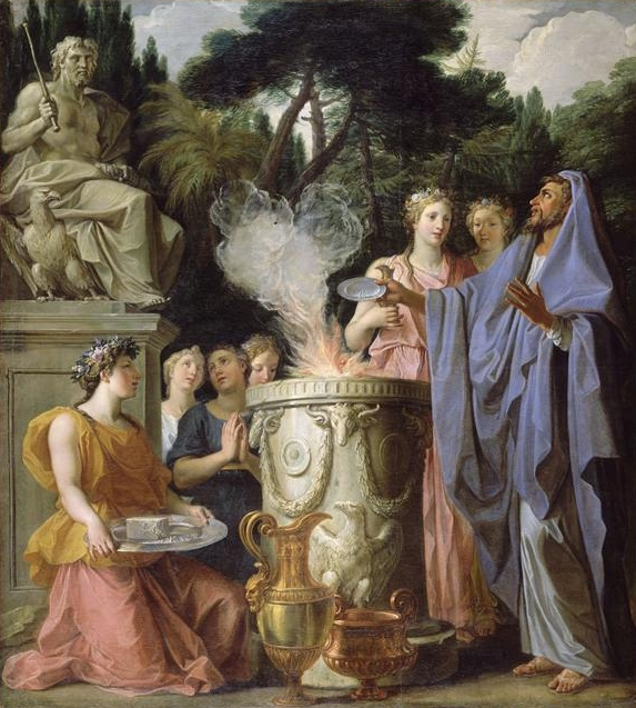 SACRIFICE A JUPITER ; Salon : Salle des gardes de la reine, Grands appartements du Château de Versailles Emplacement : paroi ; ouest; dessus-de-cheminée